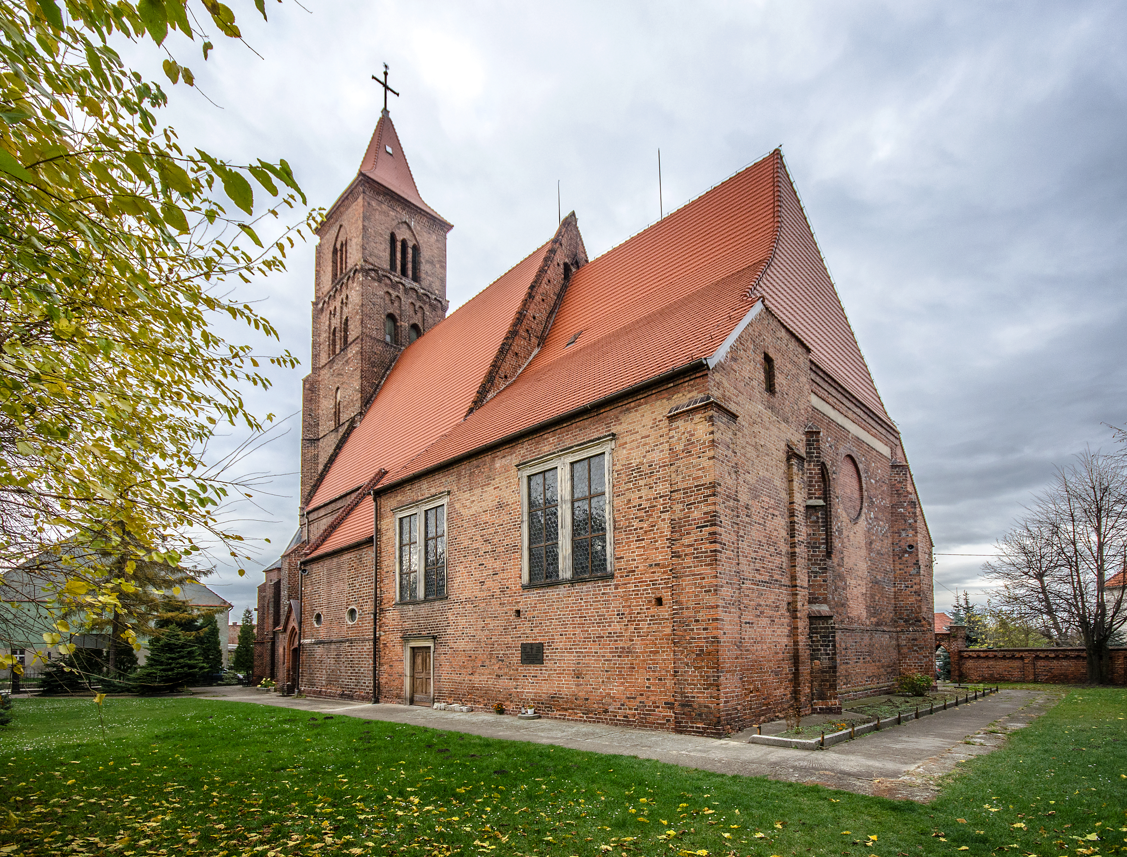 Prusice, kościół par. p.w. św. Jakuba Starszego, 1 ćw. XV, 1492, 1835, 3 ćw. XIX